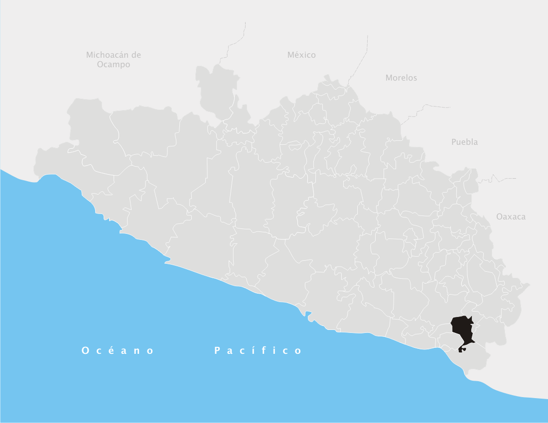 Localización del municipio de Azoyú, en el estado de Guerrero (México)